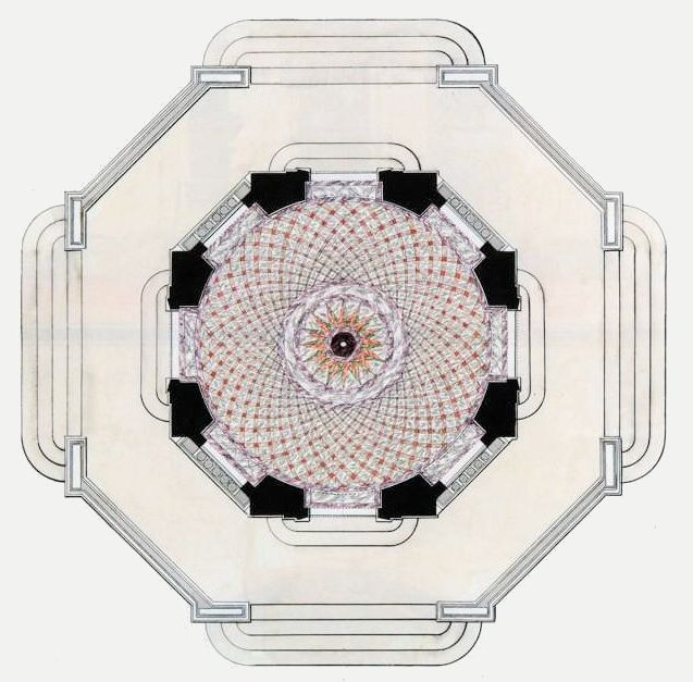 Plan du Belvédère - Bibliothèque de Modène - Richard Mique - 1786